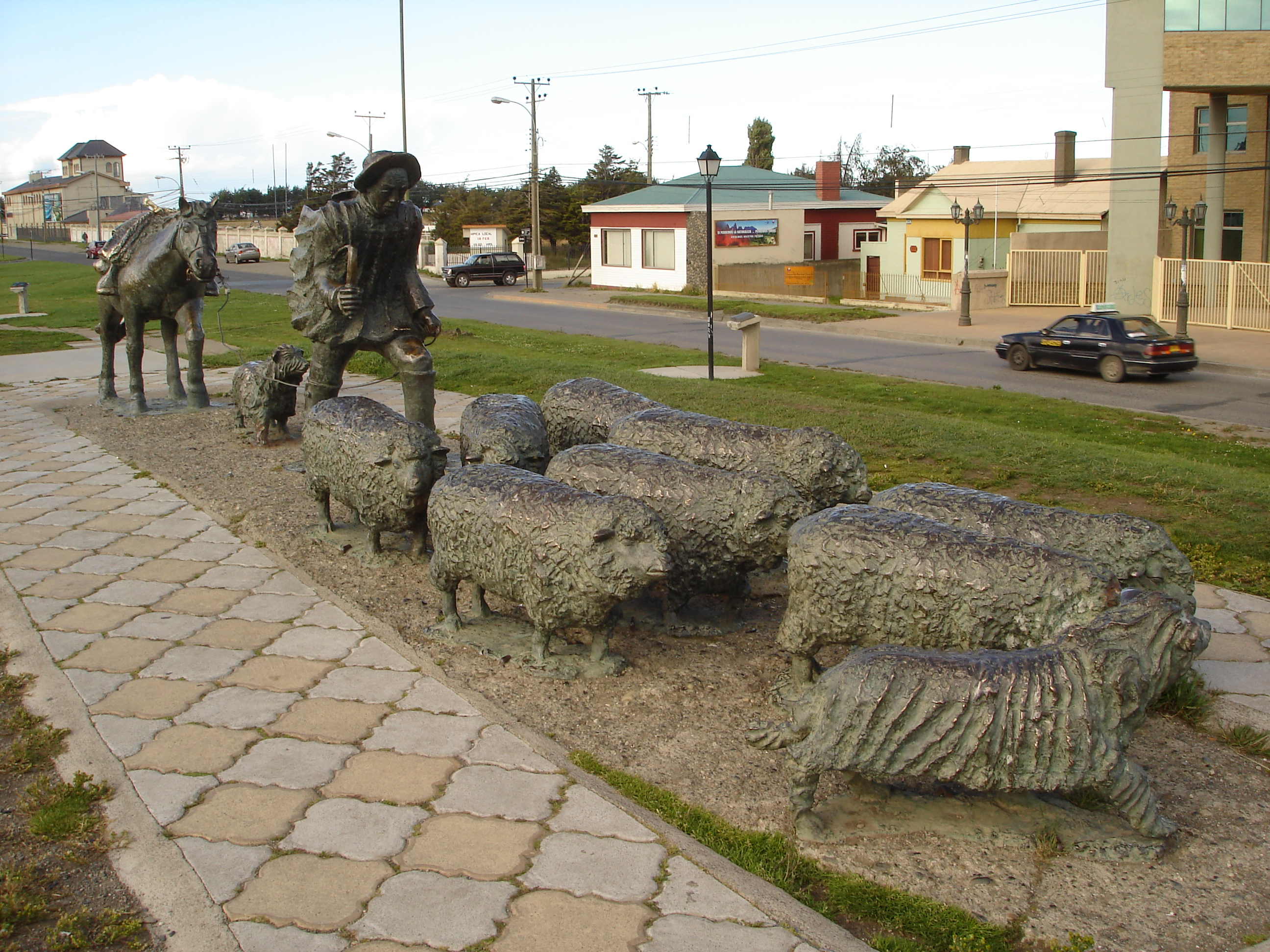 Monumento al Ovejero, Punta Arenas, Chile